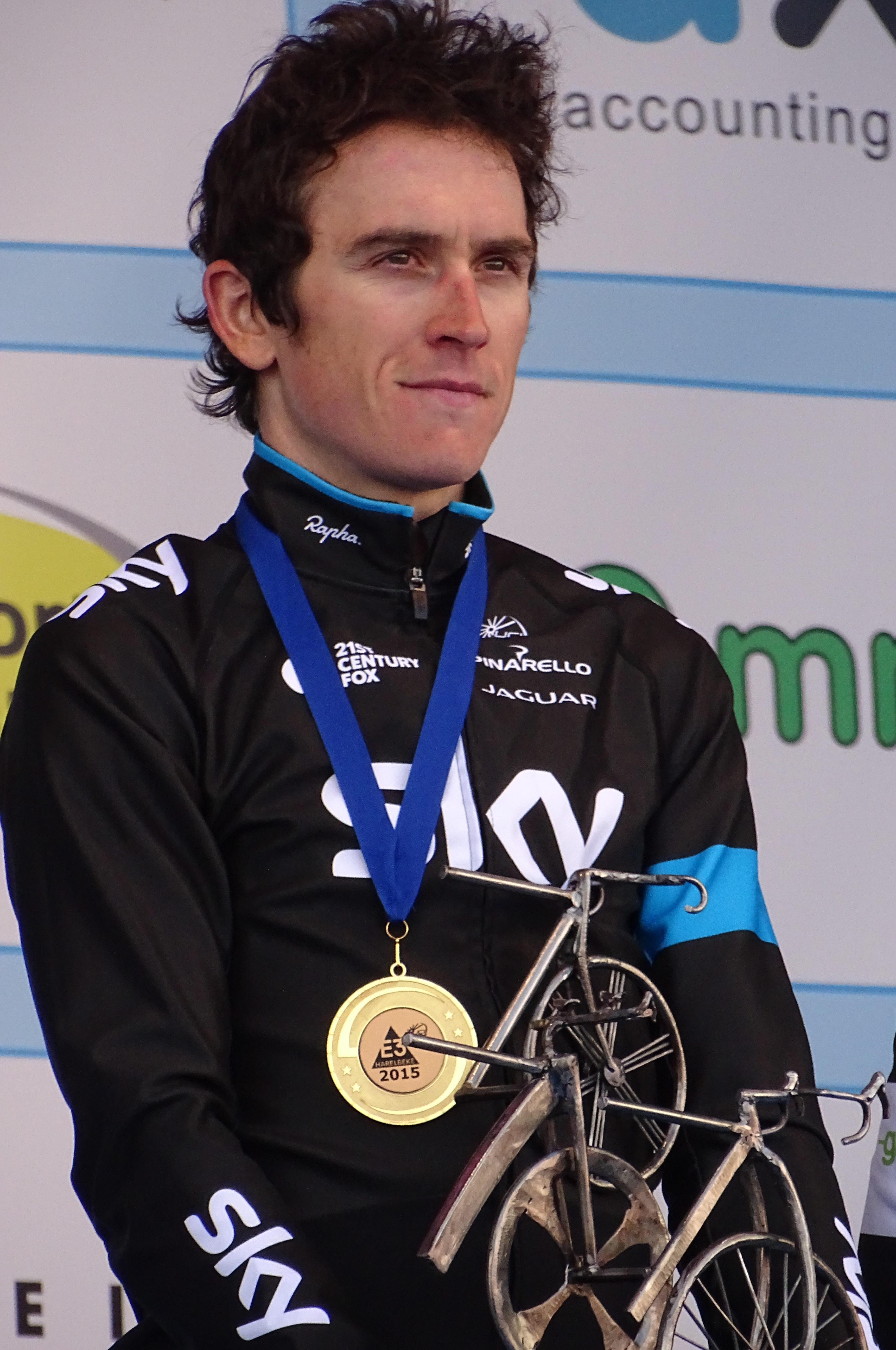 Reportage réalisé le vendredi 27 mars à l'occasion du départ et de l'arrivée du Grand Prix E3 2015 à Harelbeke, Belgique.